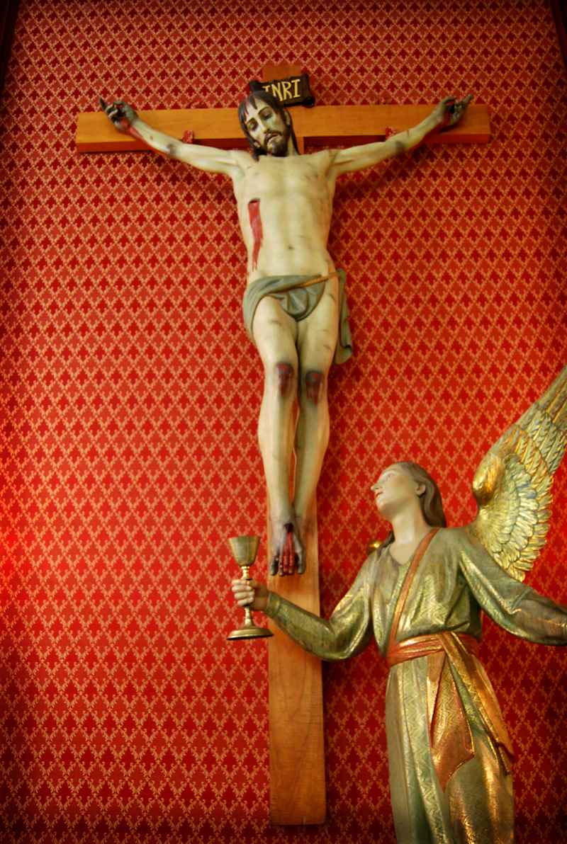 Grupo escultórico del Cristo de la Sangre. Es obra de Juan Gonzalez Moreno para el Paso Blanco de Huércal-Overa. Año 1967